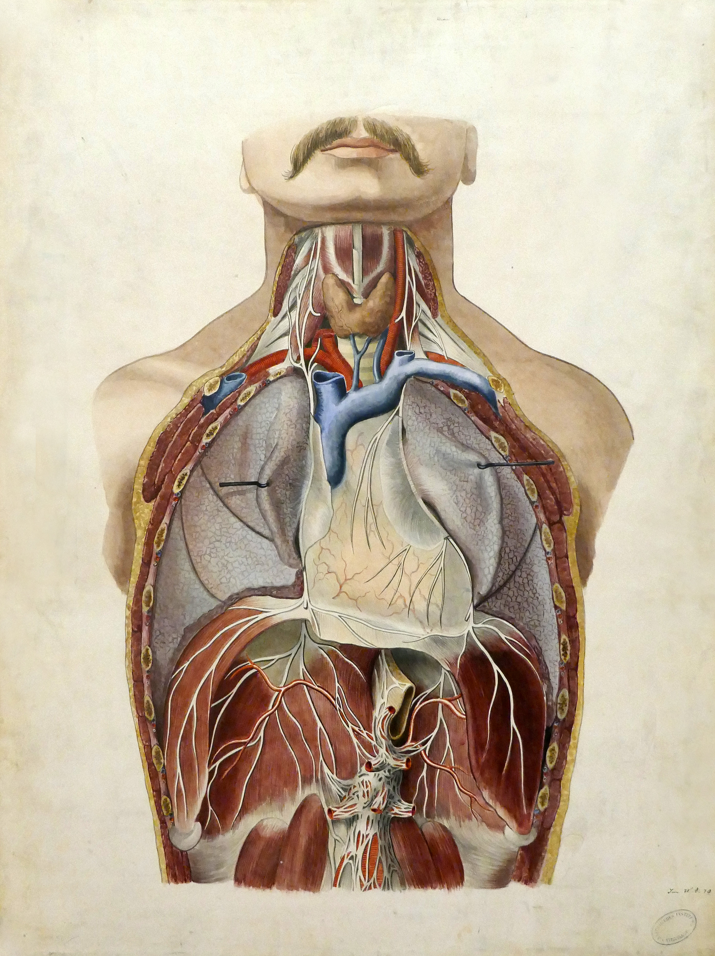 Jean Wittmaack (illustrateur à la Faculté de Médecine). Planche anatomique peinte. Vue de face représentant les viscères du cou et du thorax ainsi que la partie haute de la paroi abdominale postérieure, vers 1880. Aquarelle et gouache. Collection de l'Institut d'Anatomie normale. Université de Strasbourg. Exposition Laboratoire d'Europe Strasbourg, 1880-1930 au Musée d'art moderne et contemporain de Strasbourg.